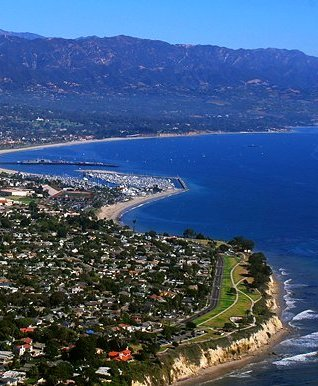 Aerial photo: Santa Barbara, California